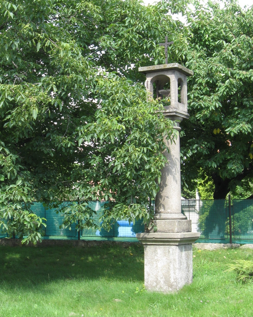 Zvonička (Hodkovice), Hodkovice